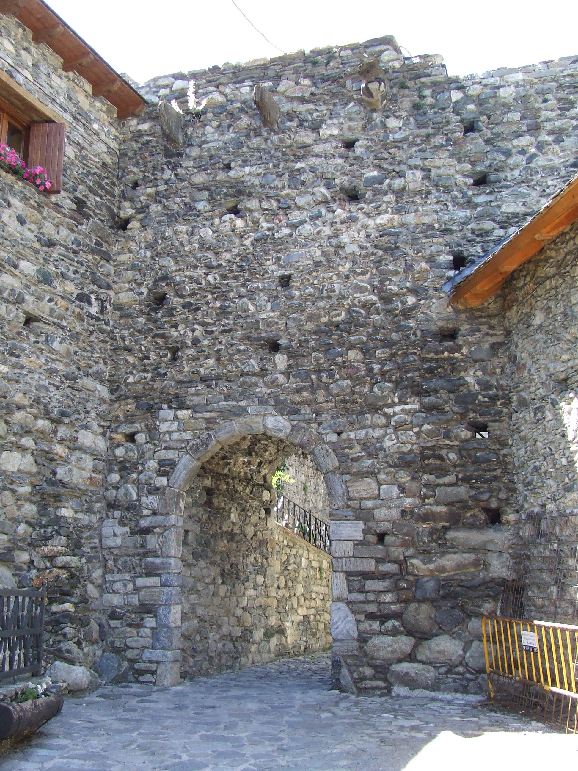 Porta d'accés al poble de Boí (Vall de Boí, Alta Ribagorça)